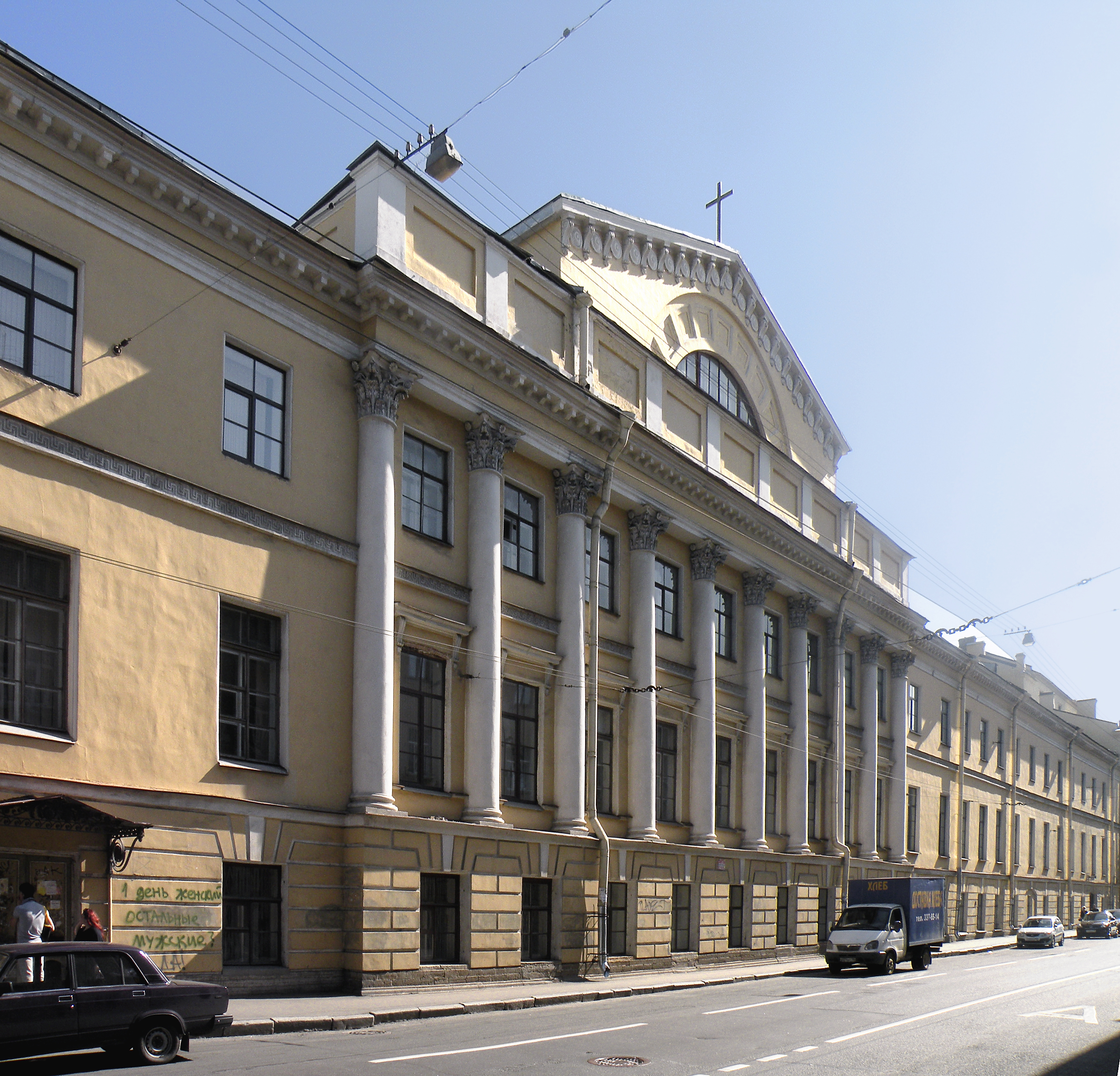 Здание бывшего Императорского училища глухонемых с церковью Апостолов Петра и Павла (Гороховая ул., 18).